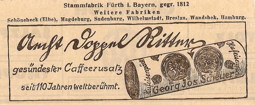 Reklame Zichorienfabrik Georg Joseph Scheuer um 1900